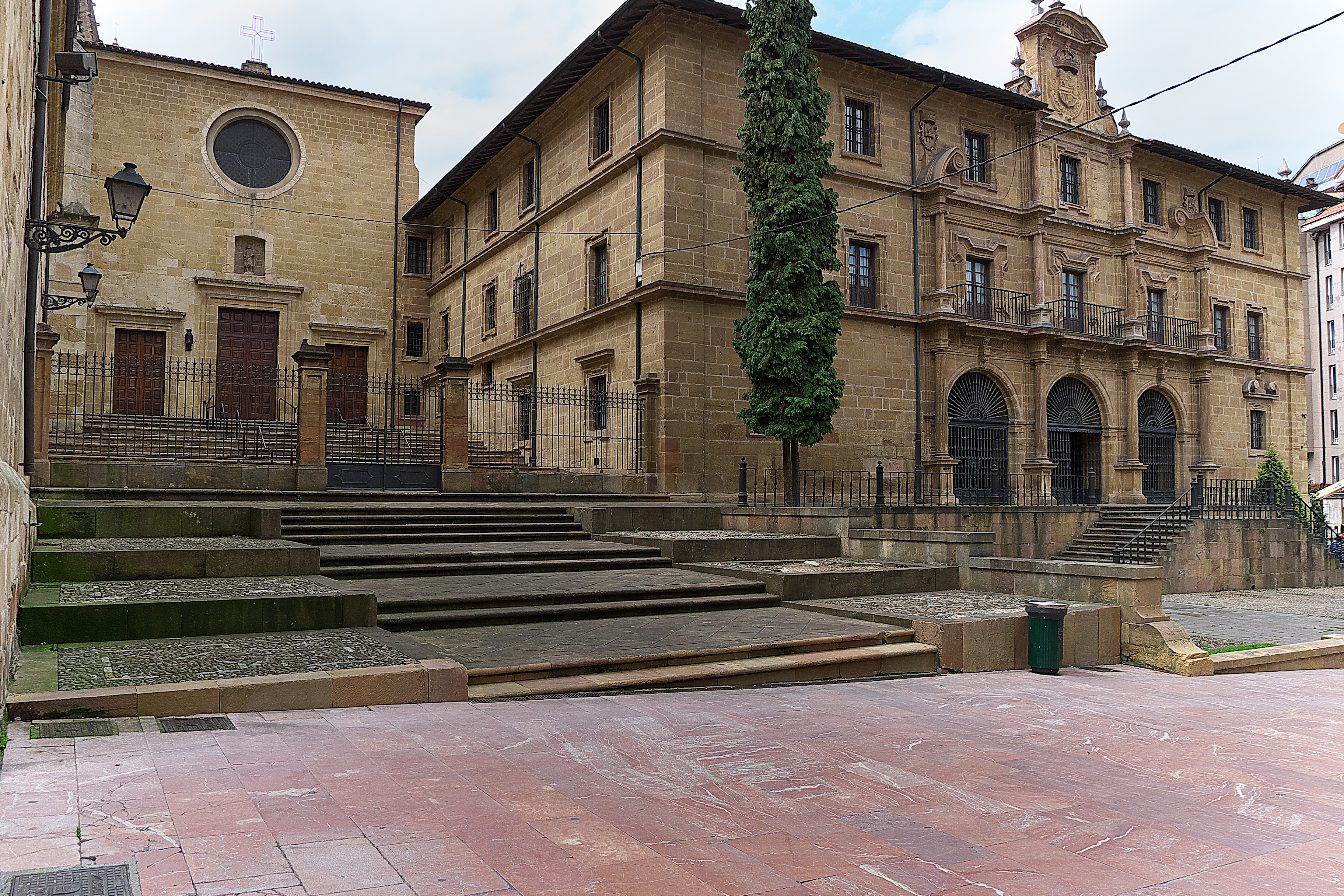 Monasterio de San Pelayo (Oviedo). Este monasterio benedictino nos evoca la historia más antigua de la ciudad.